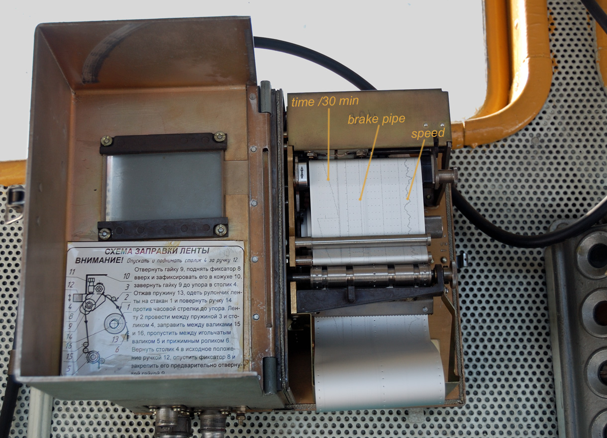 Блок регистрации БР-2 системы контроля параметров движения КПД-3, тепловоз ТЭМ2